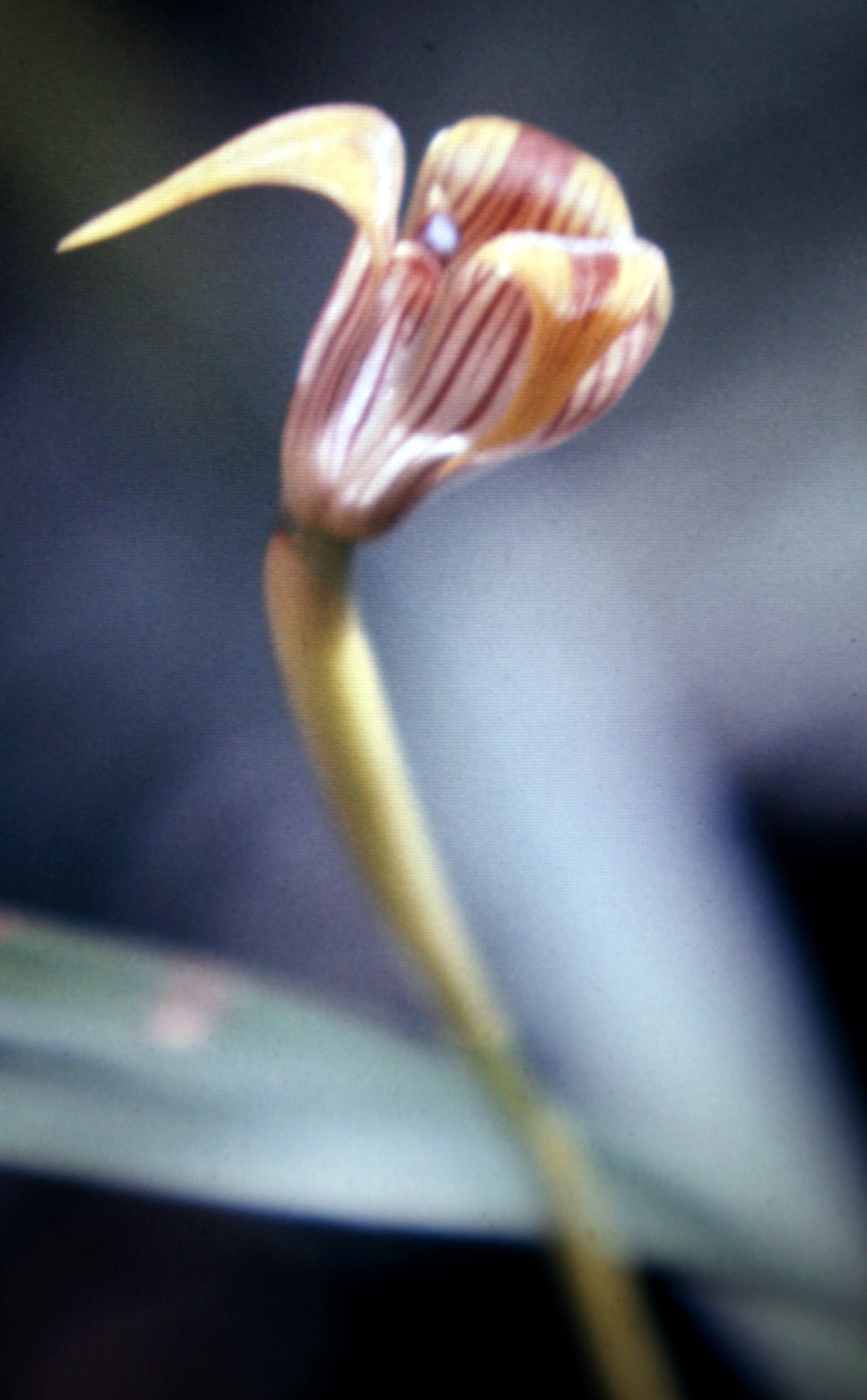 Trigonidium acuminatum, Suriname.